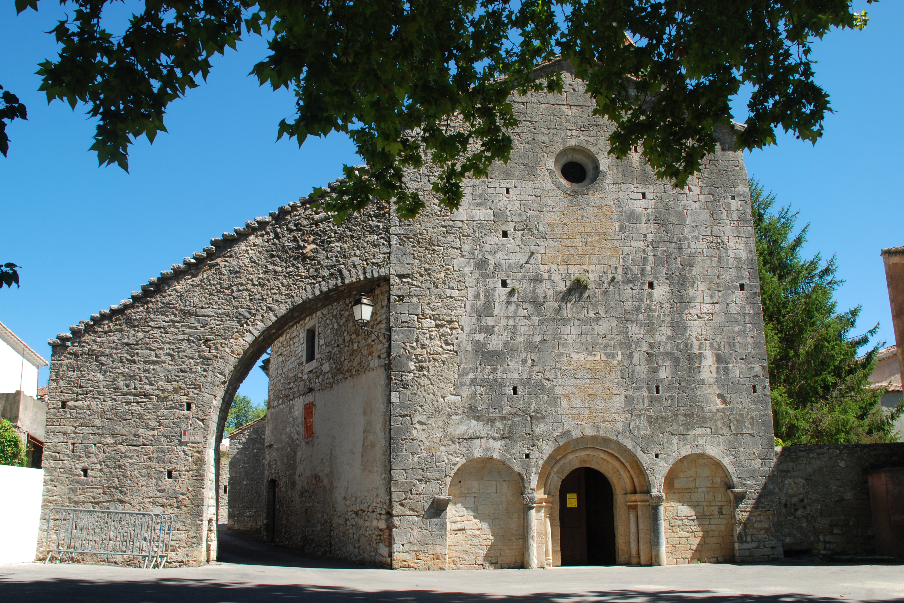 France - Hérault - Église Saint-Nazaire et Saint-Celse de Brissac